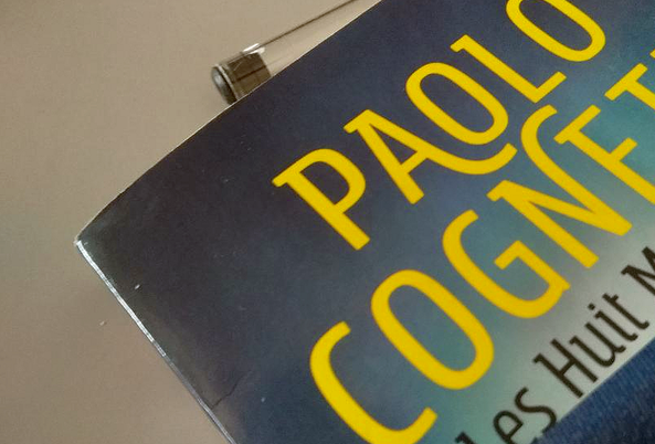 Les Huit Montages (Le otto montagne): dettaglio della copertina dell'edizione 2017 del romanzo di Paolo Cogne